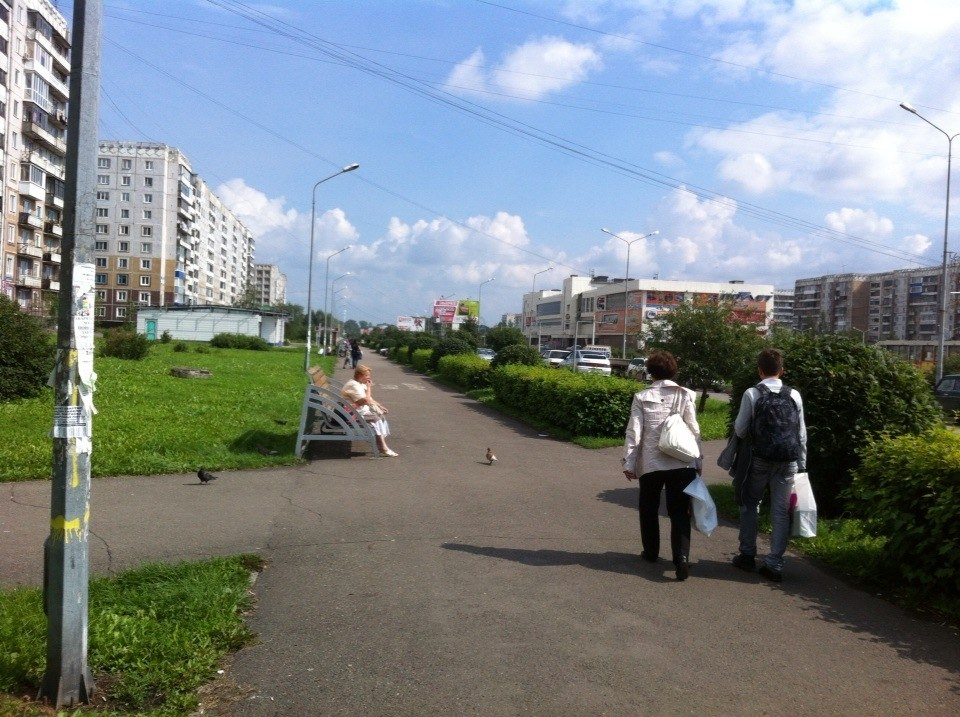 Проспект Шахтёров в Орджоникидзевском районе Новокузнецка